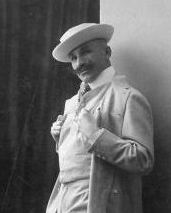 Jan Čermák (1870 - 1959), Český pilot, průkopník letectví.